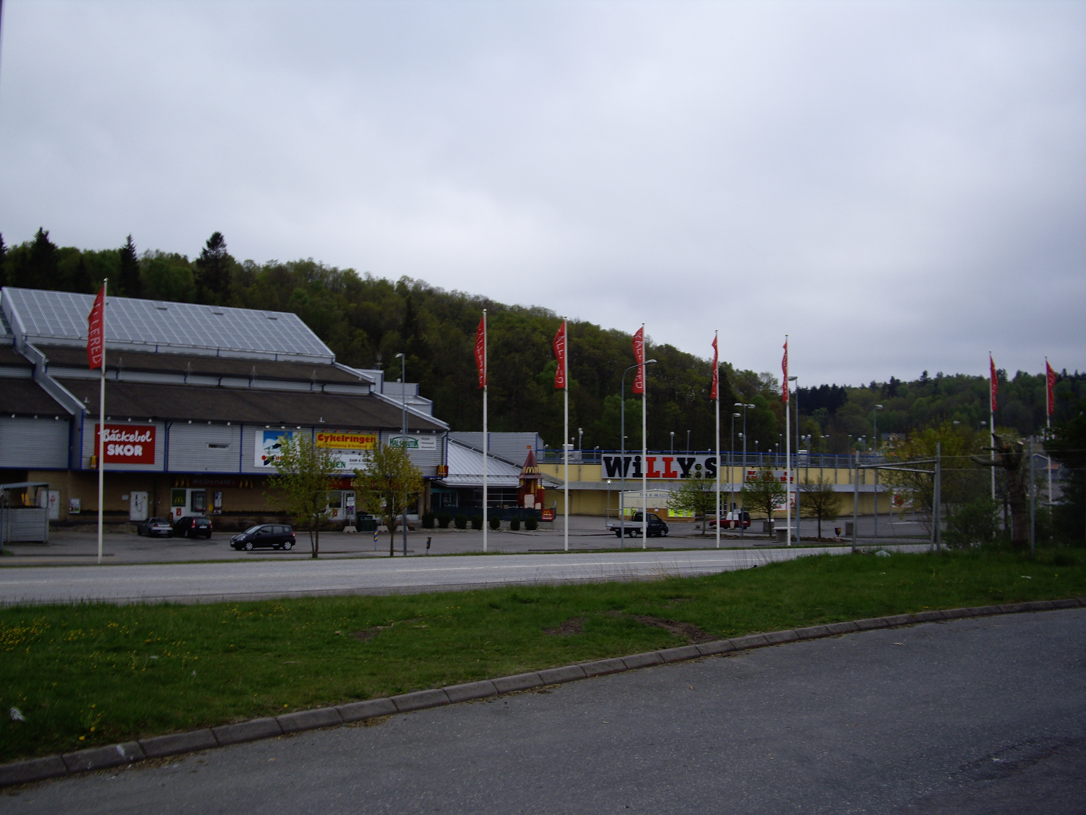 Eken Center som ligger i Kållered. Bild tagen ifrån IKEA